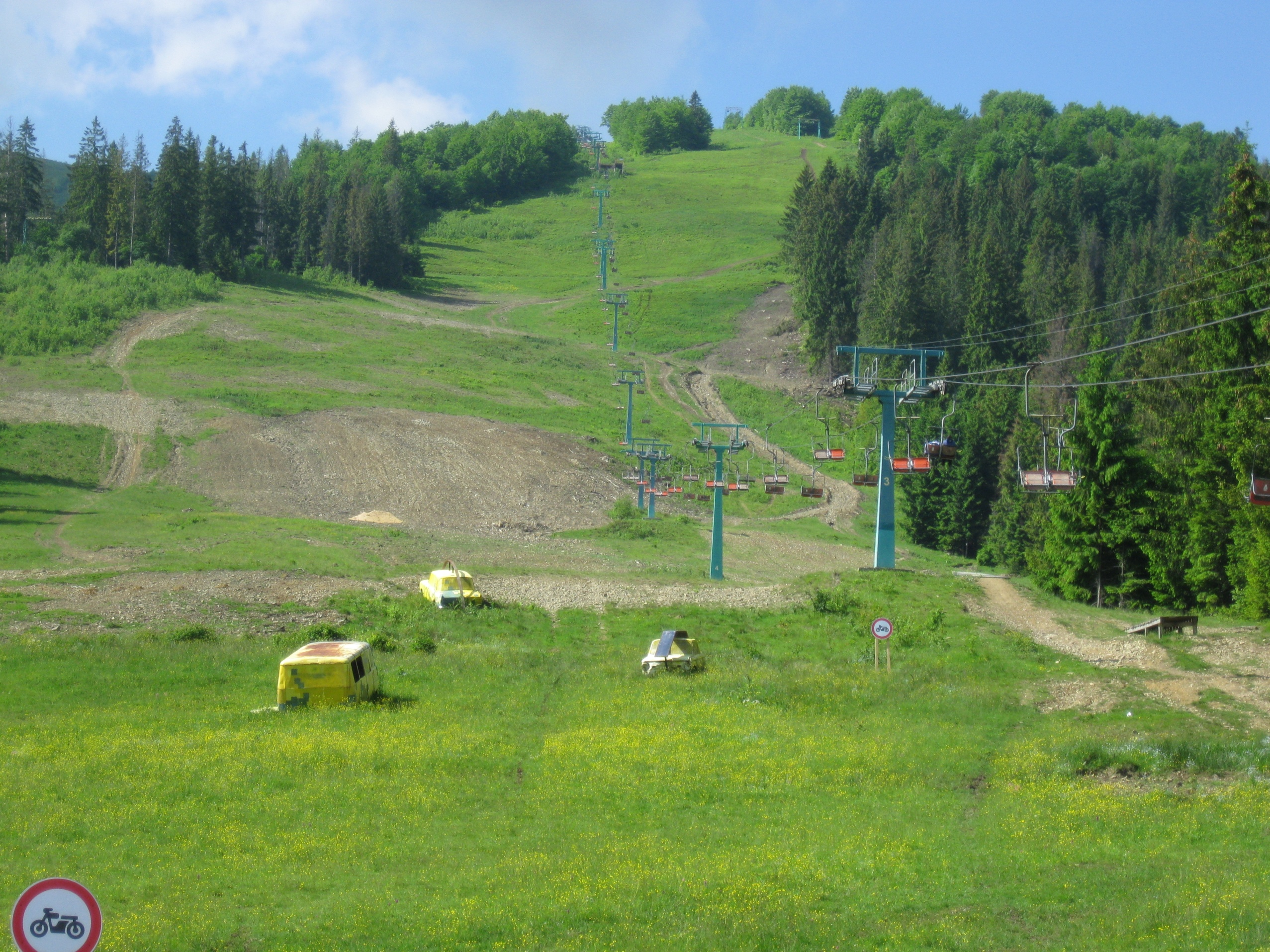 Канатний витяг на гору Гемба (1491 м)